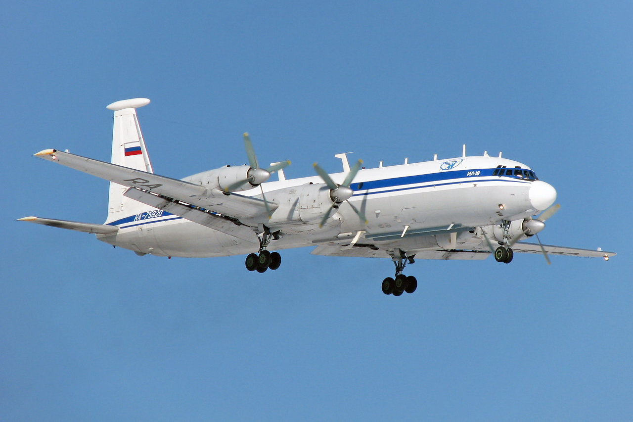 Ил-22М-11 Зебра RA-75920 (cn 2964017551) на аэродроме Чкаловский.